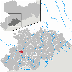 Bernsbach im Erzgebirgskreis, Sachsen